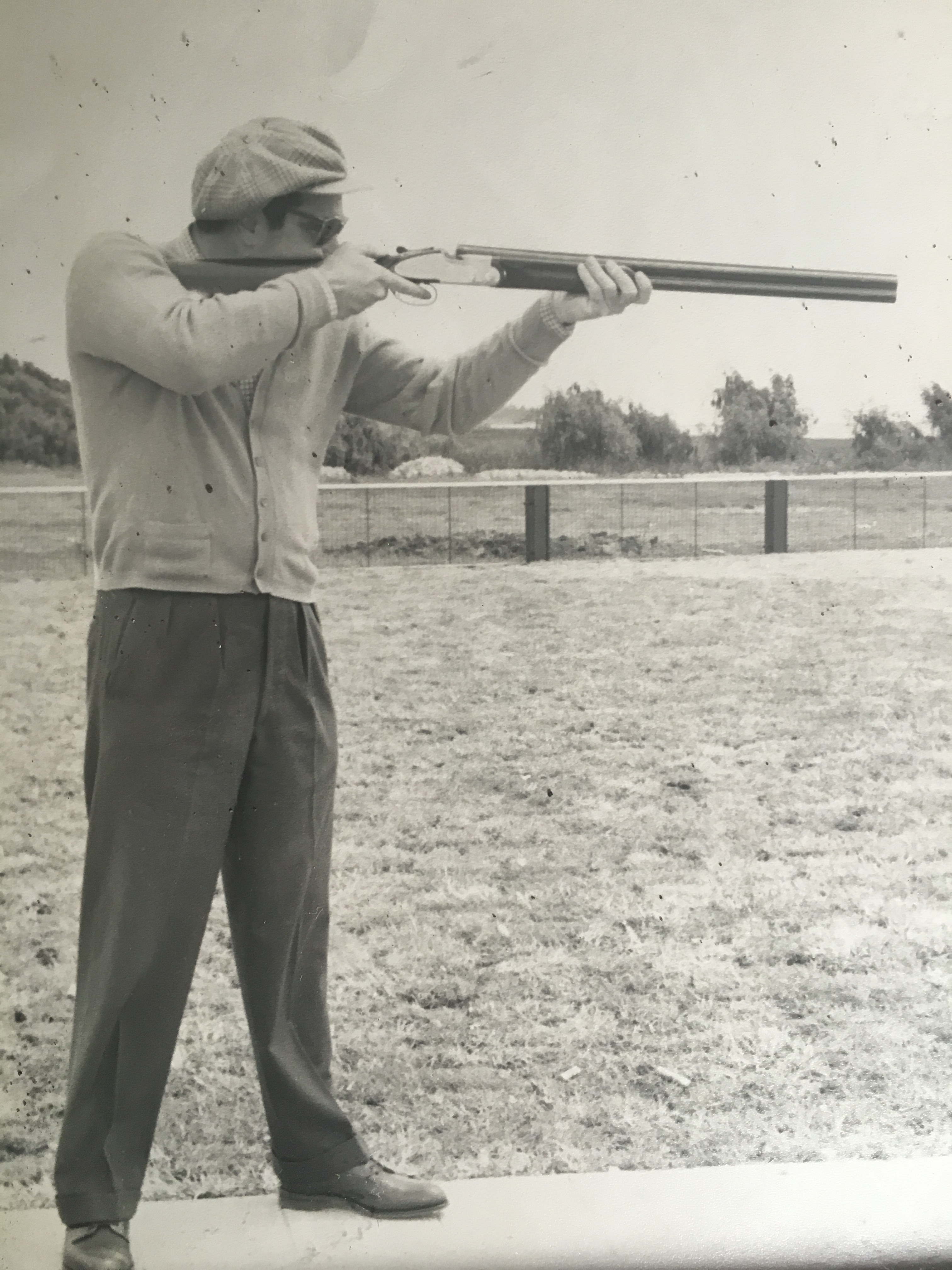 lo curro 67